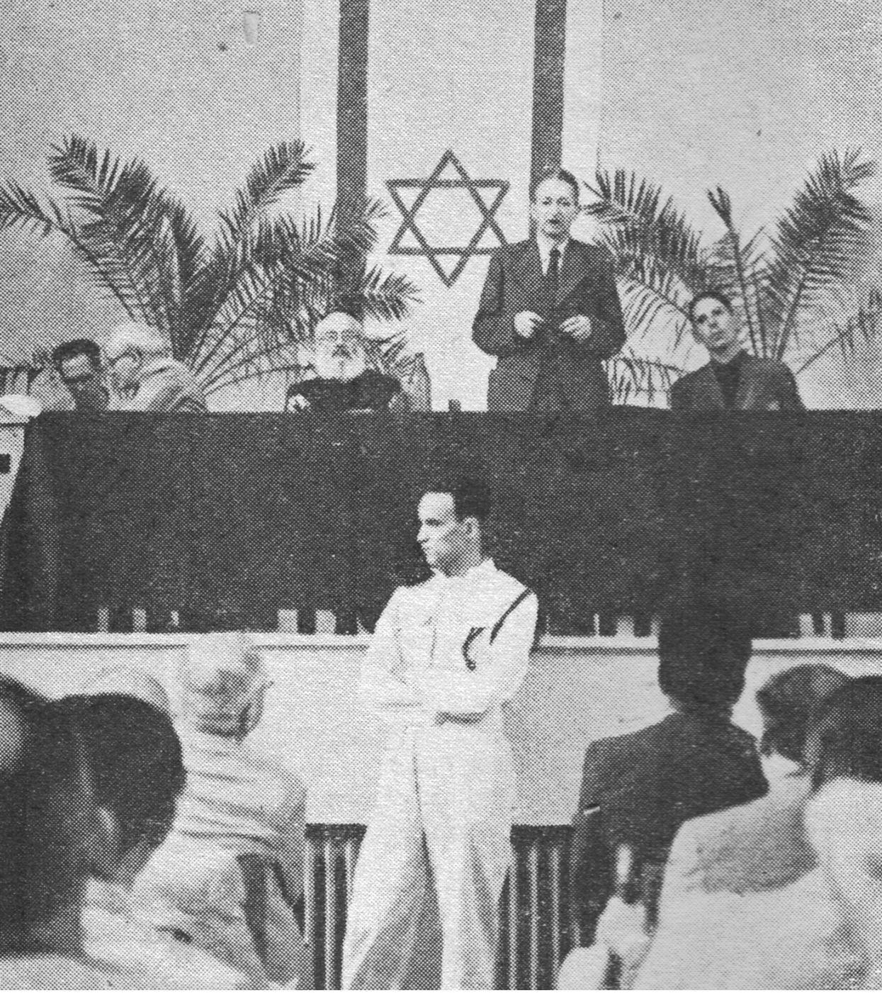 he:יצחק בן צבי נואם בפתיחת אספת הנבחרים הרביעית.